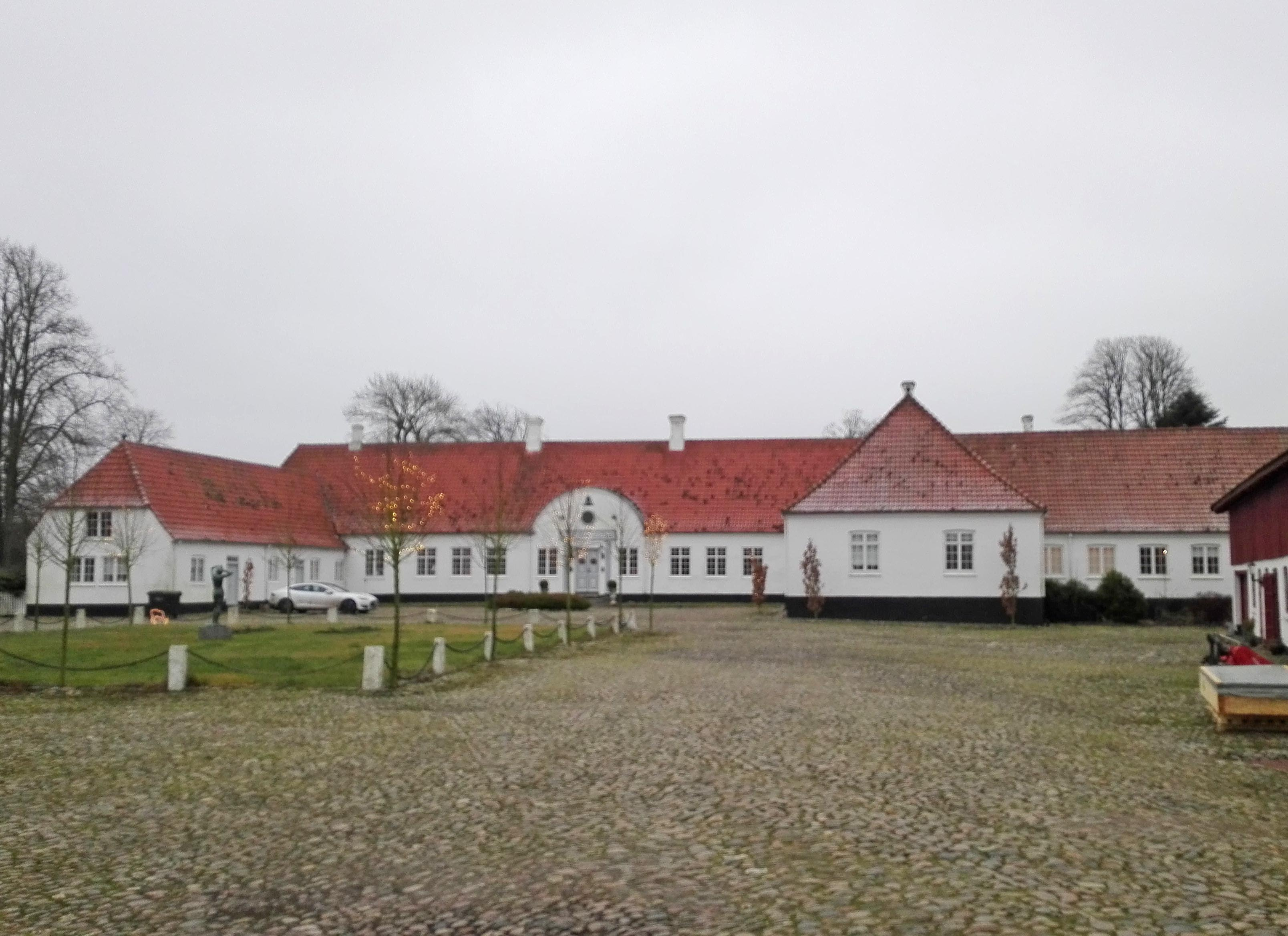 Viskum Hovedgård